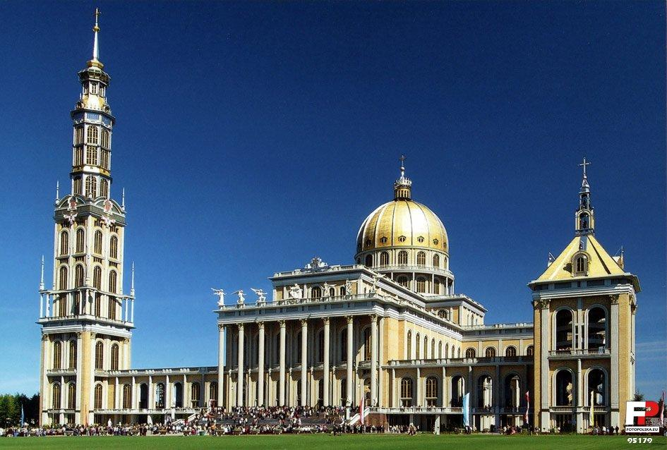 Największy polski kościół, widok od południa.